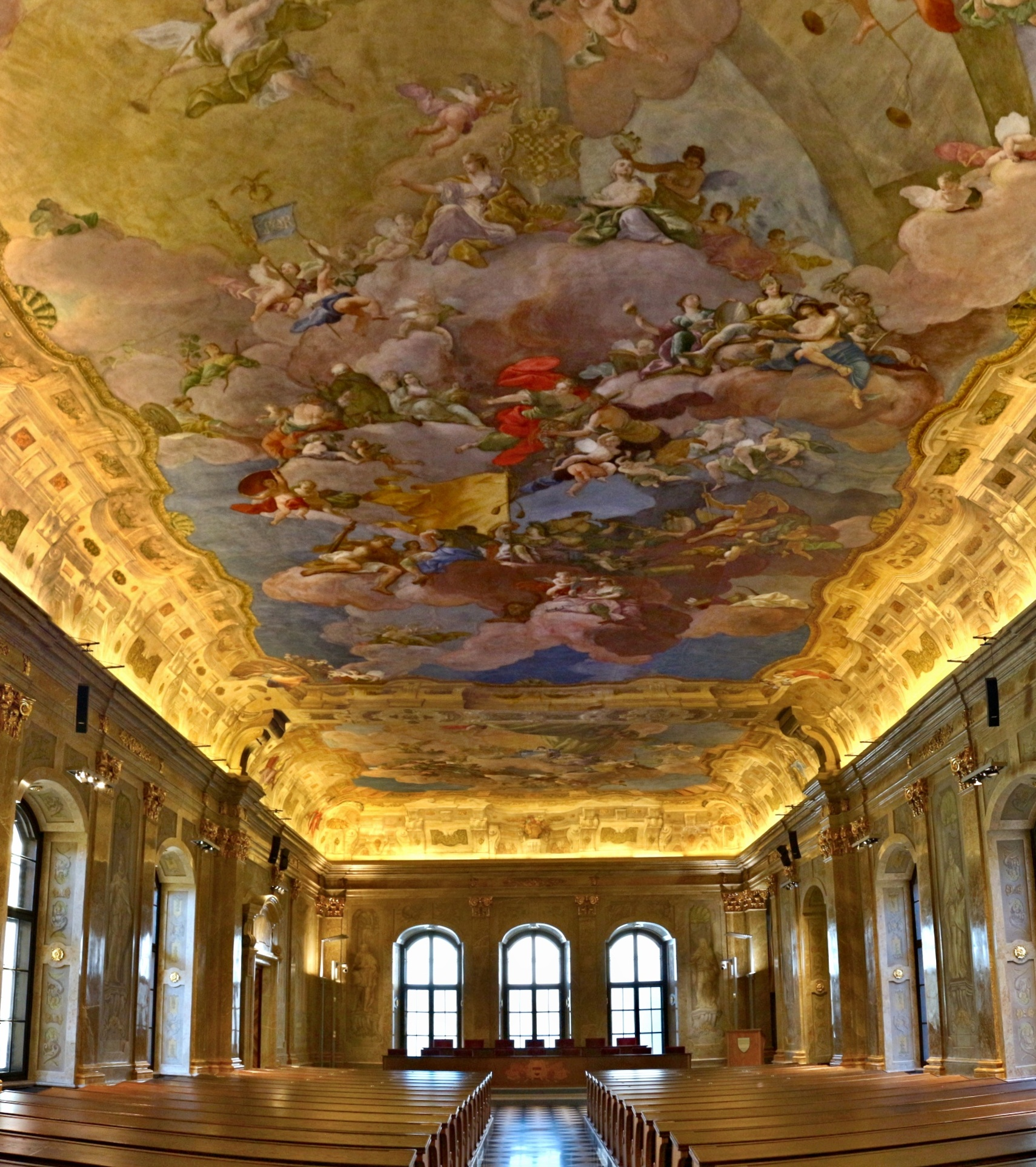 Interiér Nové radnice v Brně